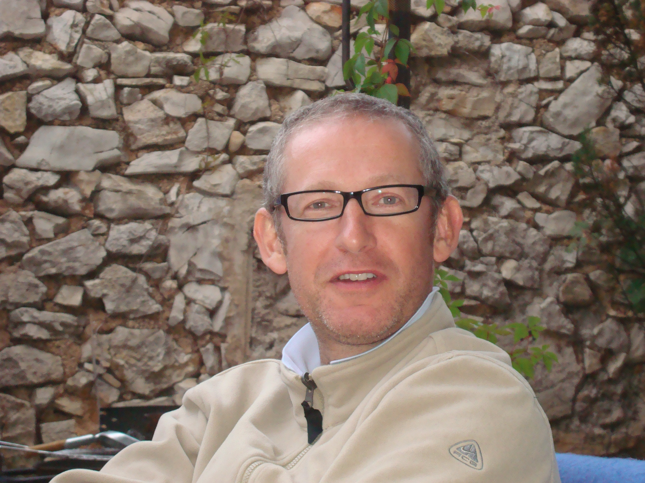 Stefan Funken, 2010